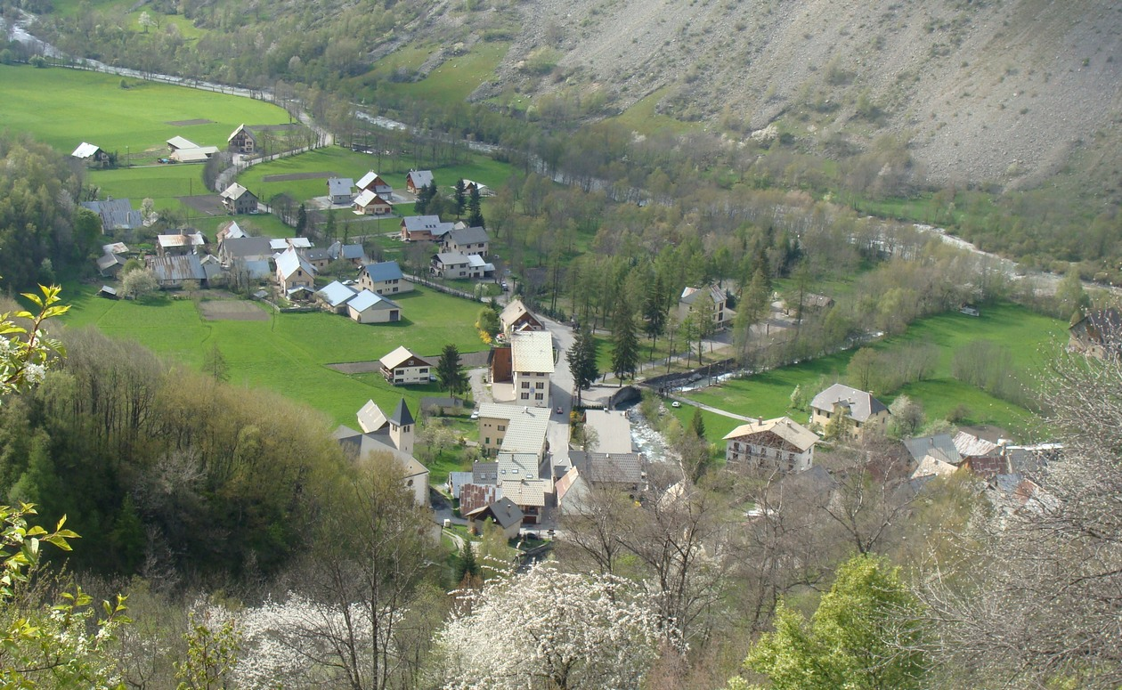 La Chapelle-en-Valgaudémar vue de la colline dominant le village au sud-est. Au fond, la Séveraisse.